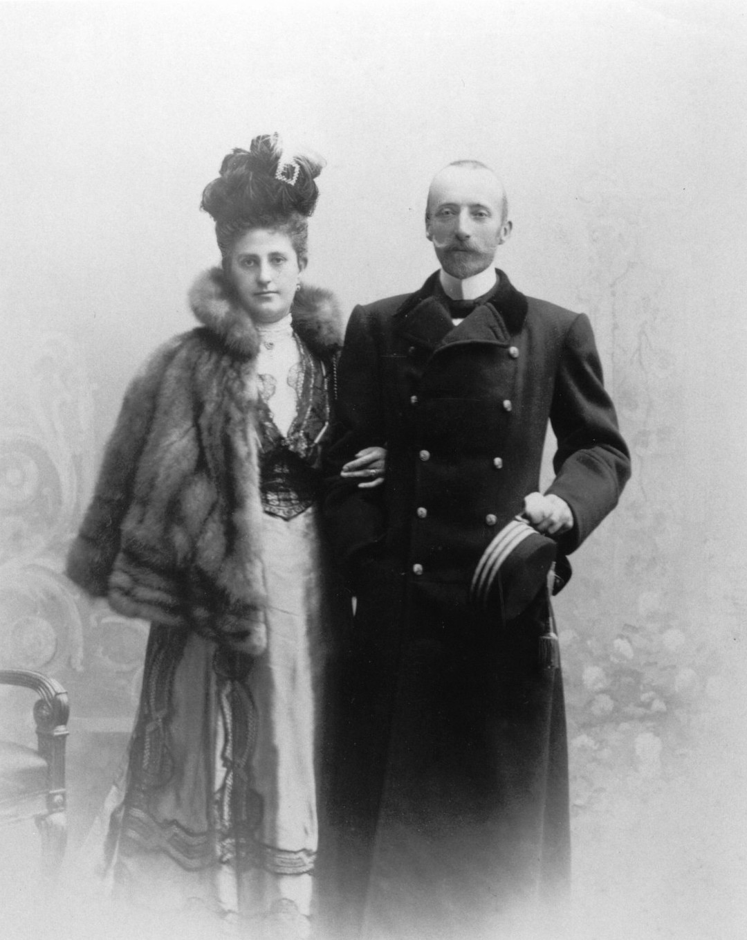 Karola Stefana Habsburga-Lotaryńskiego (1860-1933) i Marii Teresy Habsburg-Toskańskiej (1862-1933).